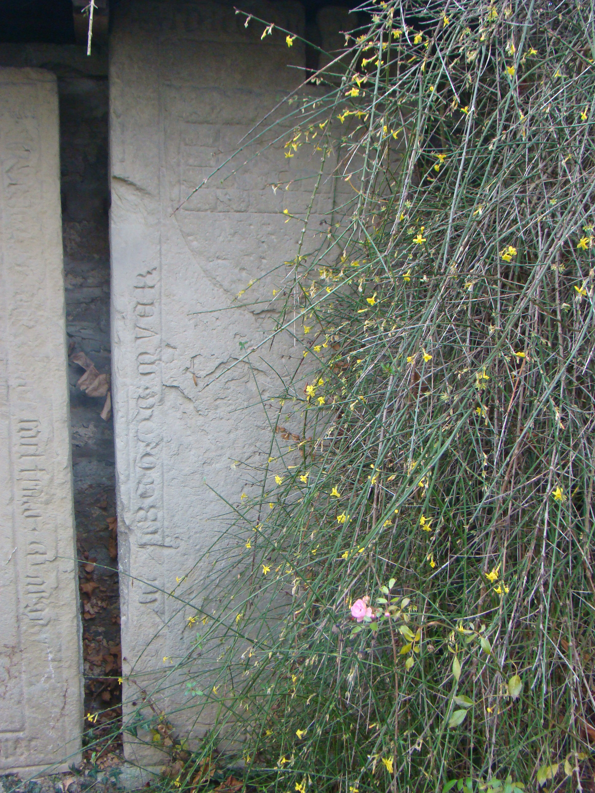 Historische Grabmale beim Unterschloss Gemmingen: Grabplatte der Elisabeth von Mauer († 1354), Gattin Dietrichs des Älteren von Gemmingen. Älteste Grabplatte beim Gemminger Schloss.